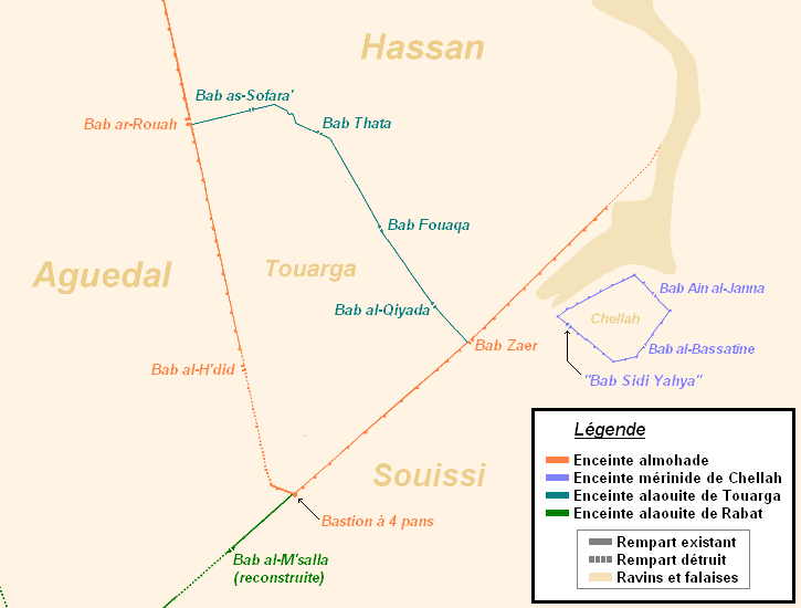 Carte des enceintes et des portes de Chellah et de Touarga, Rabat